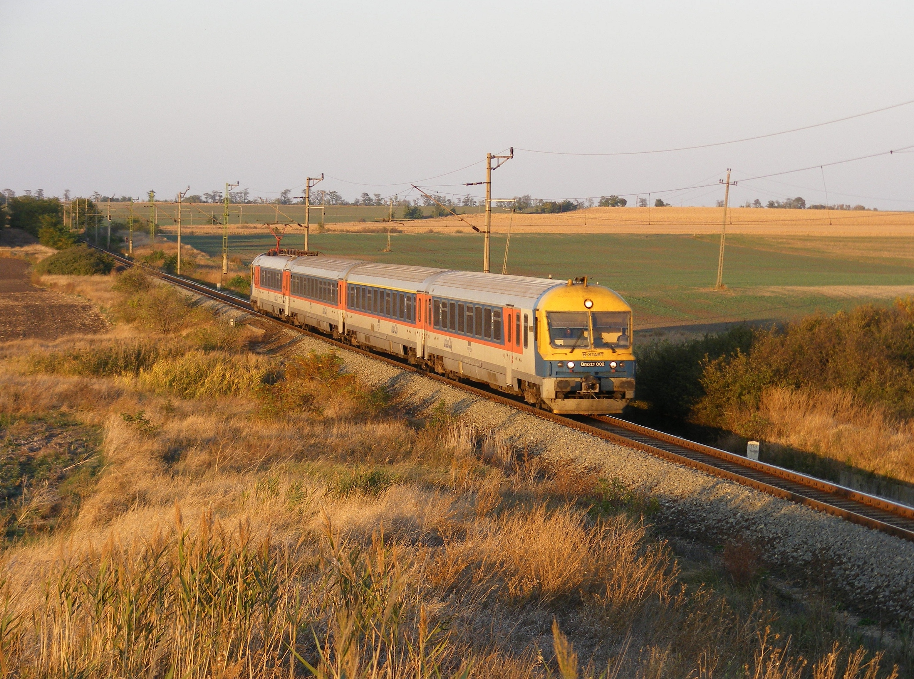 Somogy IC-ként robog a Samu a 40-es (Budapest-Pusztaszabolcs-Pécs) vonalon.